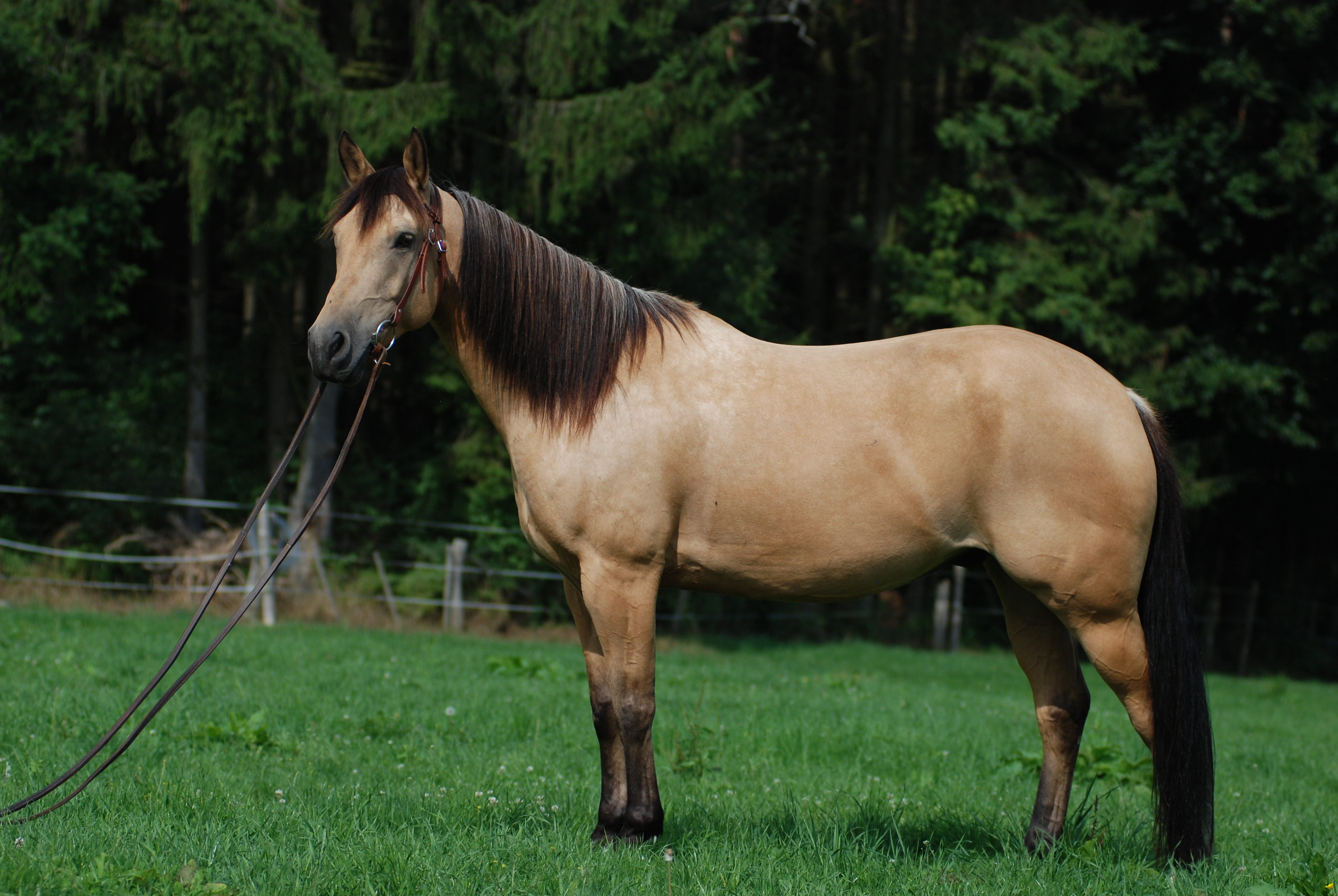 Quarter Horse in Fellfarbe Buckskin